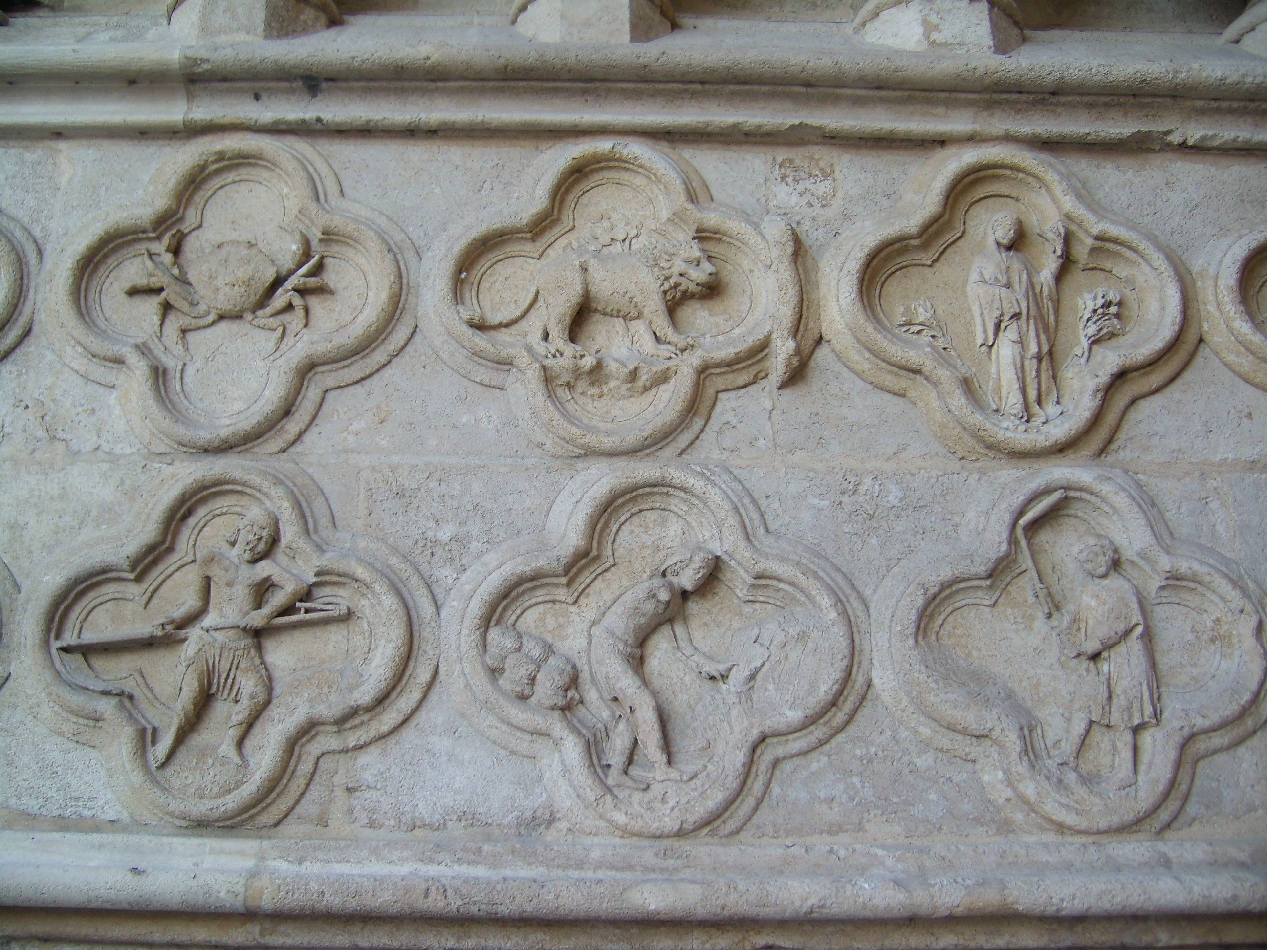 Facade de ND d'Amiens : Signes du zodiaque (Cancer/ Lion/ Vierge) et occupations agrestes (Fauchage / ? / Battage)